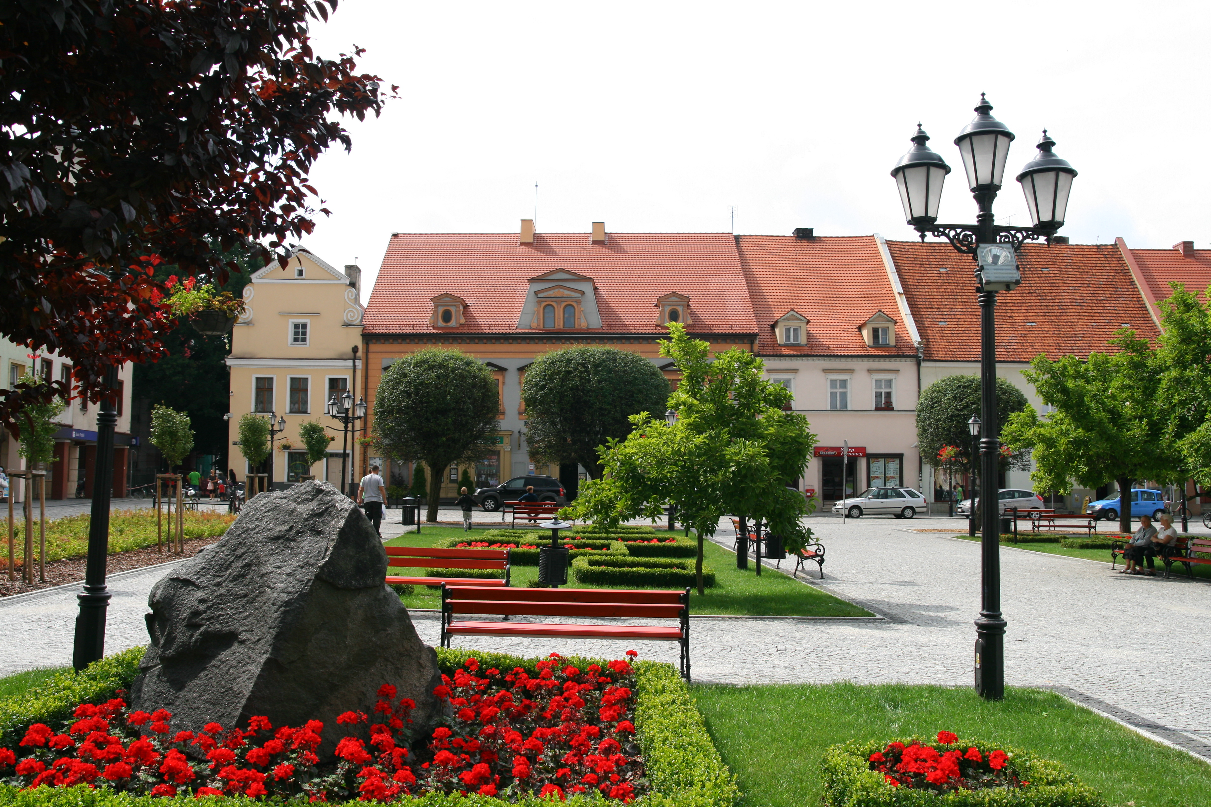 Rynek w Kluczborku.